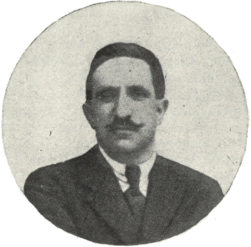 Foto autore